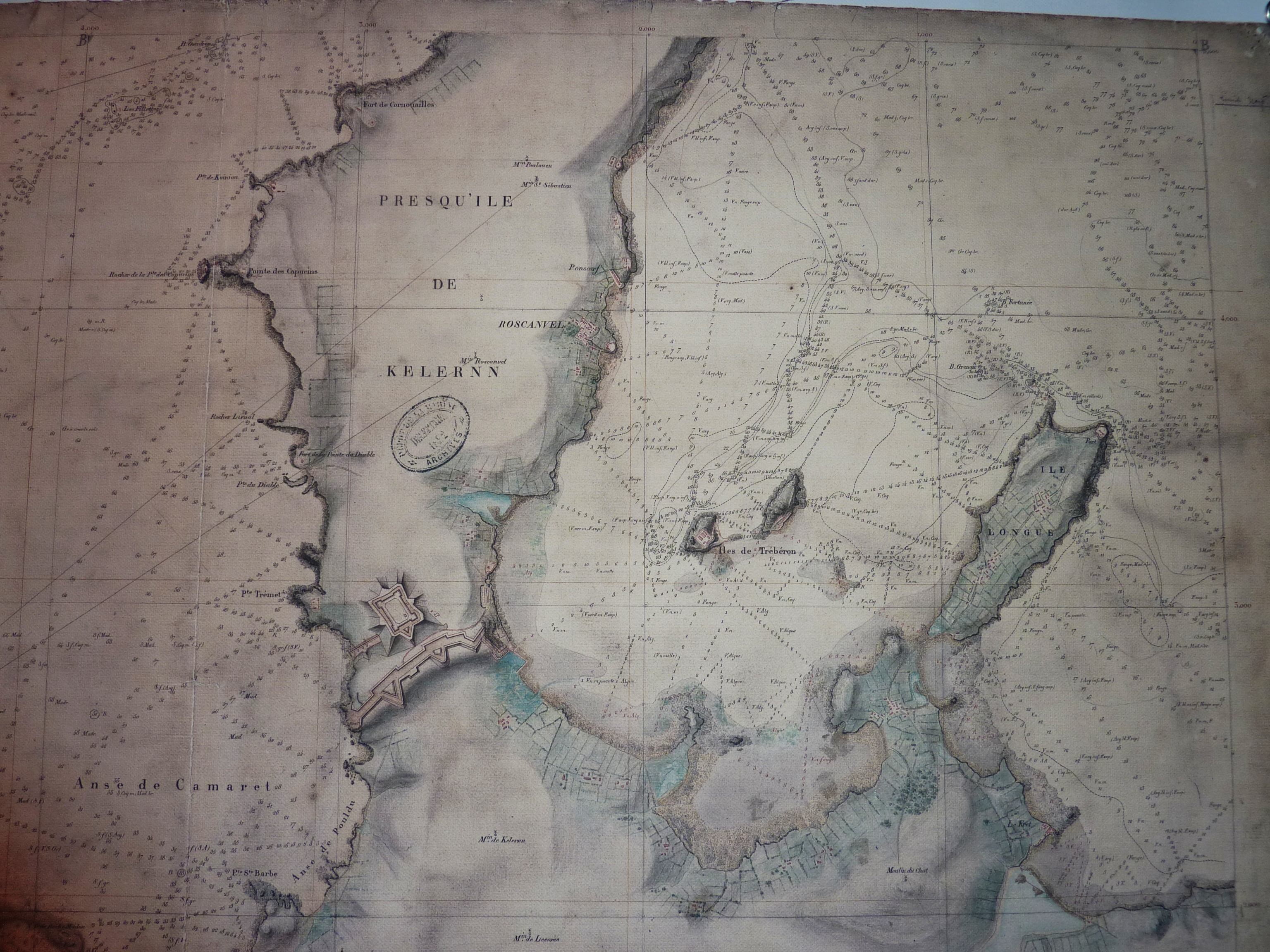 Carte de la presqu'île de Quélern (minute de levés de l'ingénieur hydrographe Beautemps-Baupré, père de l'hydrographie moderne, qui a révolutionné la qualité et la précision des cartes marines